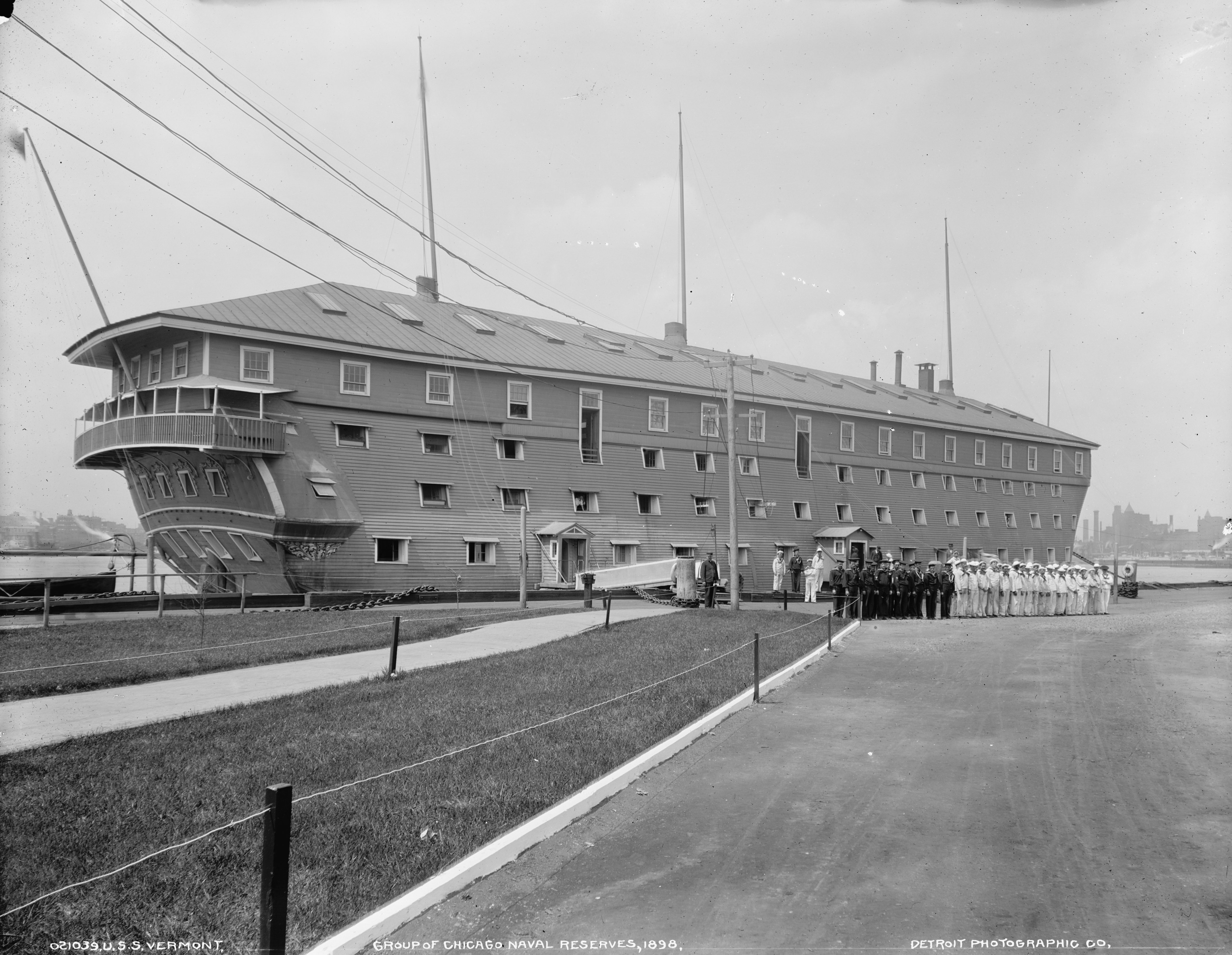 USS Vermont